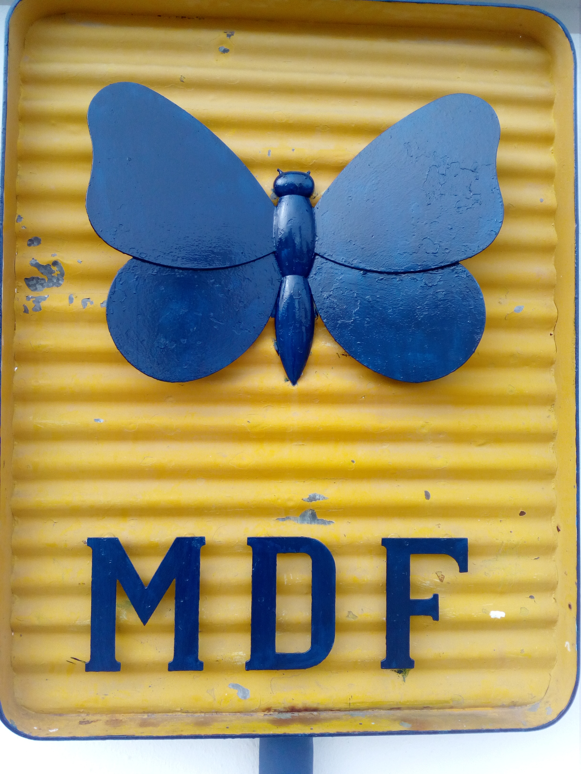 Símbolo da Metalúrgica Duarte Ferreira SARL no Campo de Jogos Comendador Octávio Duarte Ferreira em Tramagal